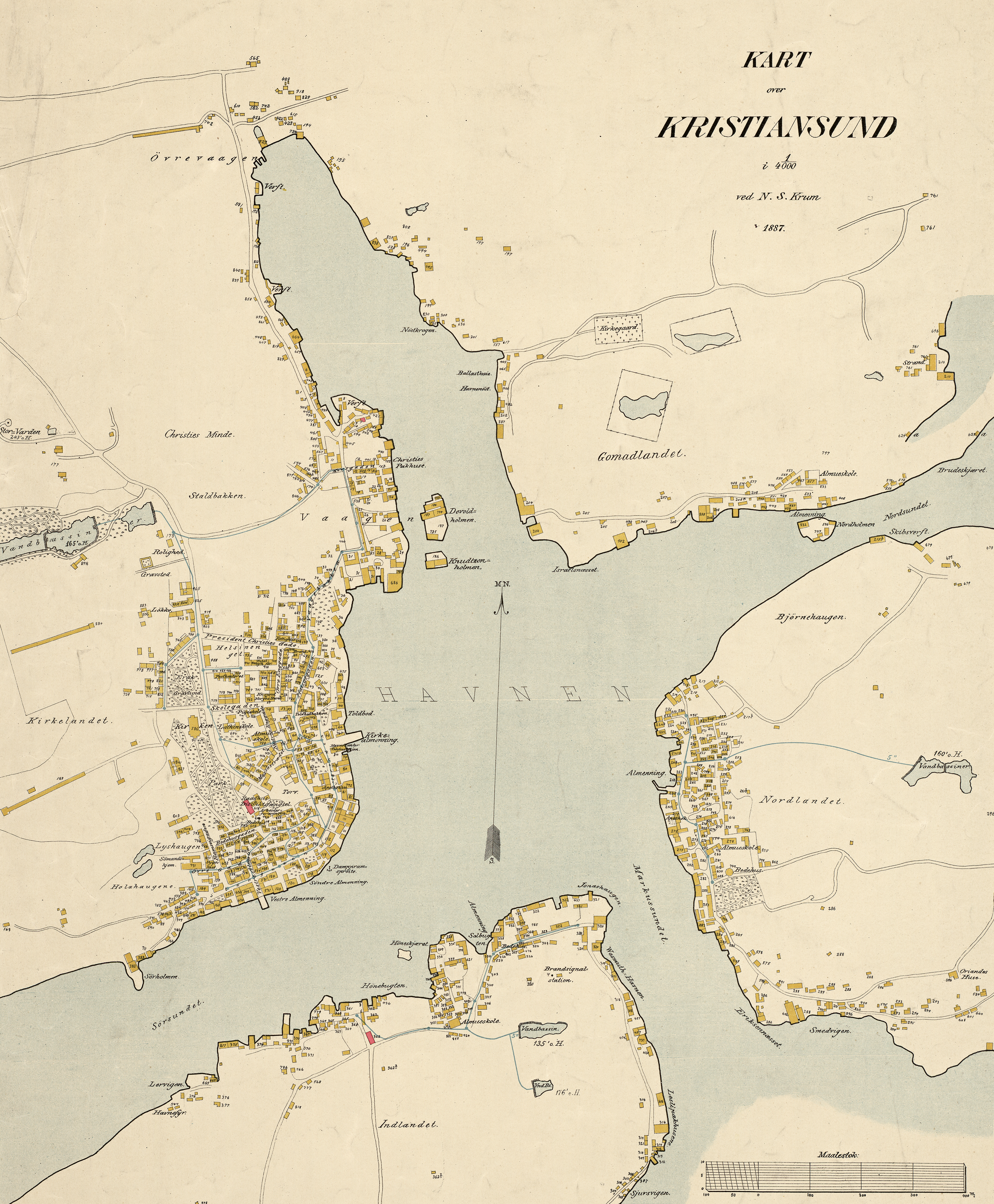 Kart over Kristiansund (1887)